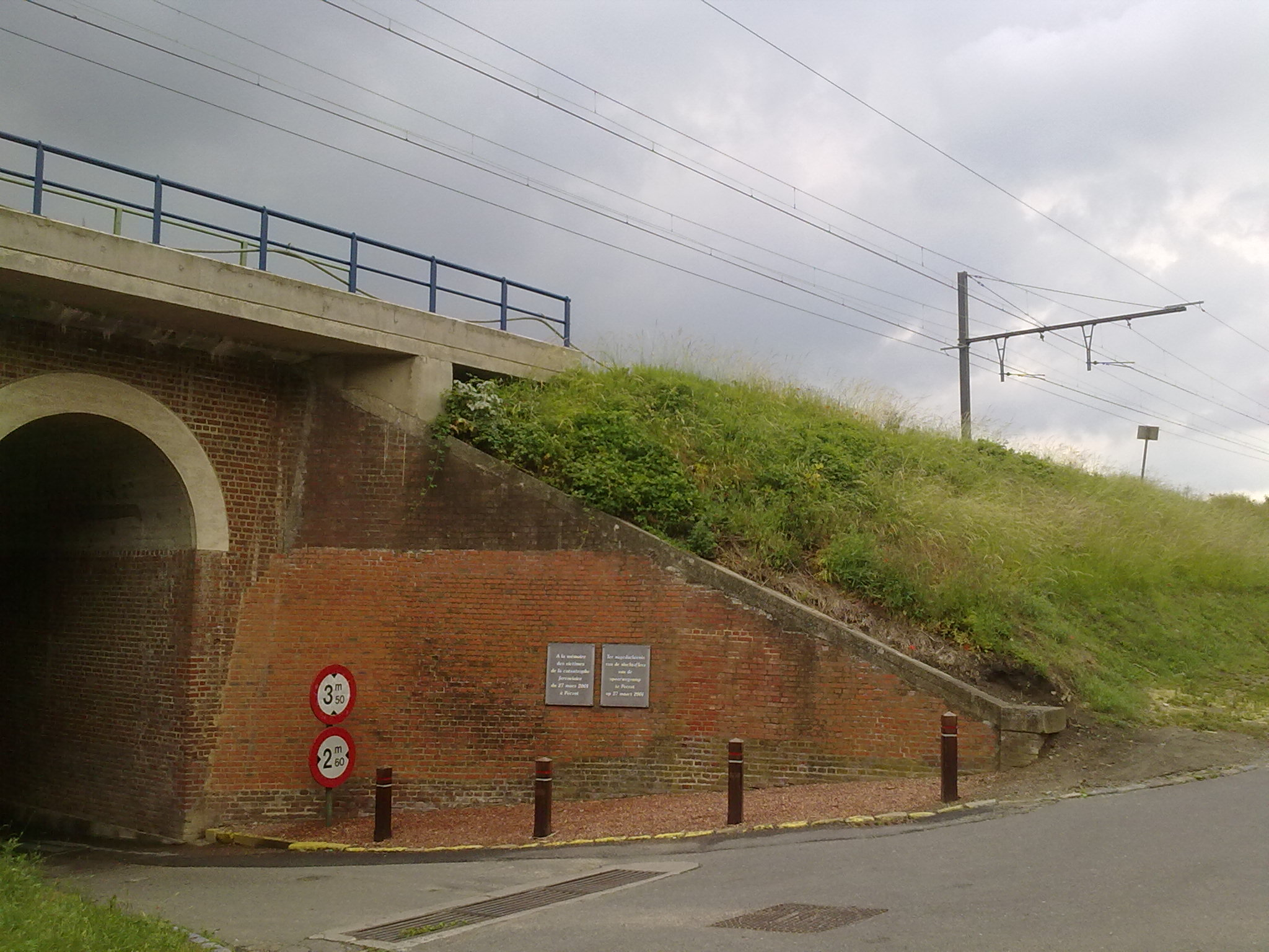 Site des plaques commémoratives en Français et Néerlandais de l'accident ferroviaire de Pécrot (Brabant Wallon) Belgique.